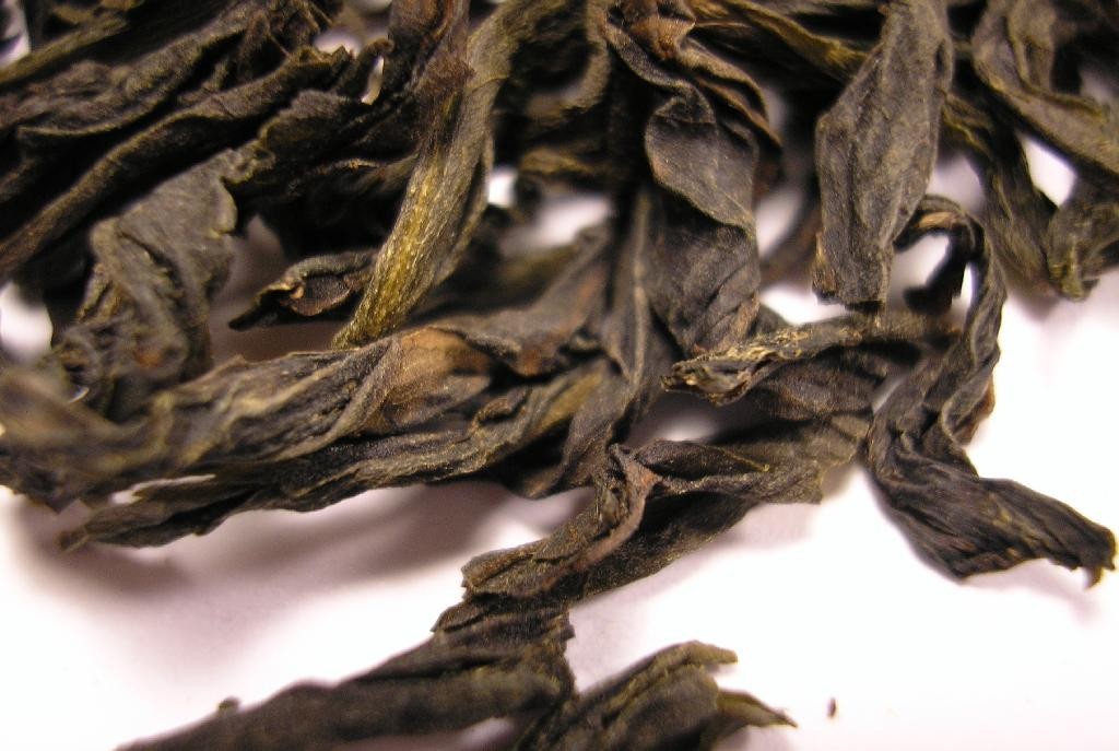 Bu Zhi Chun tea